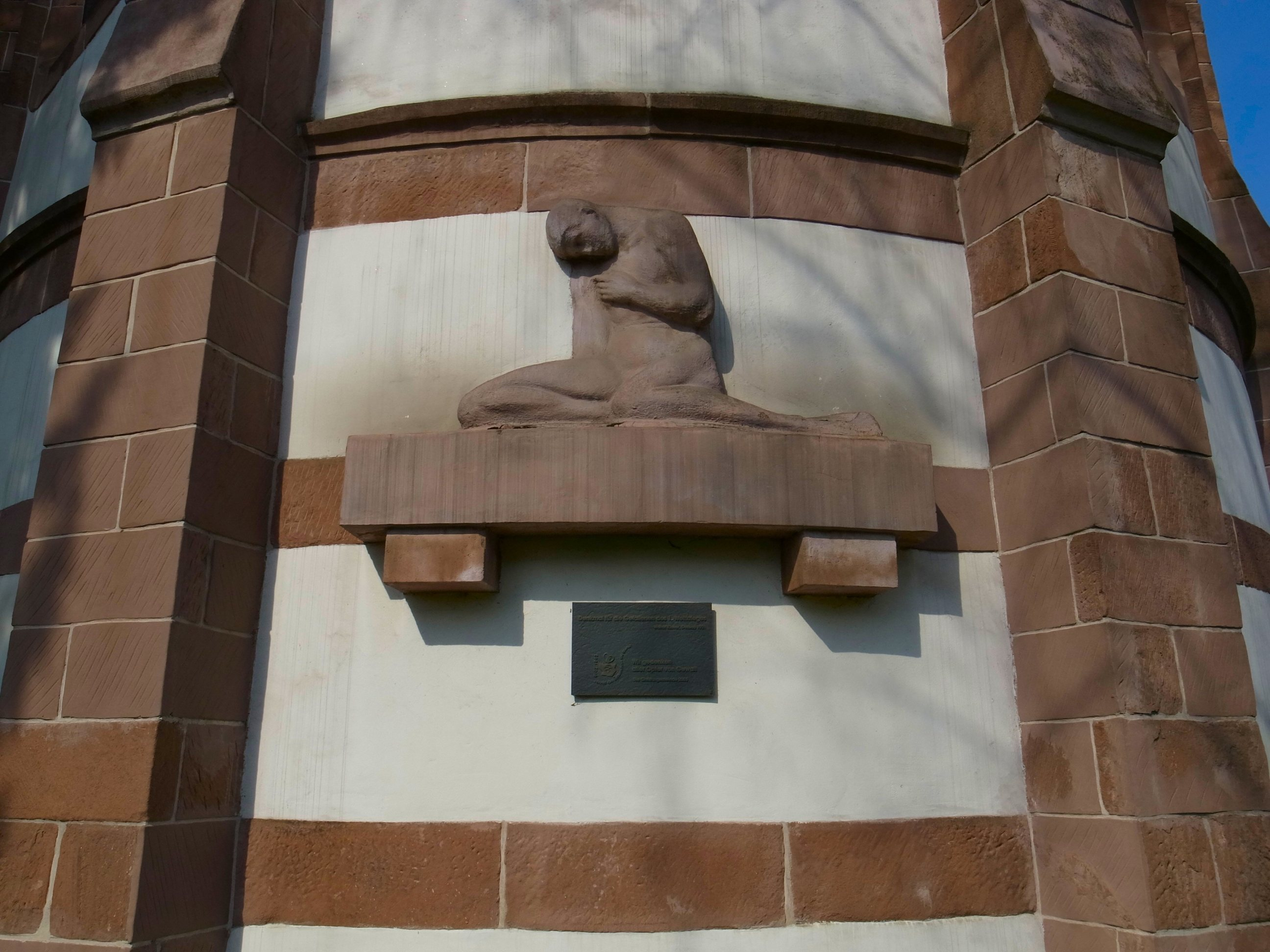 Dessau-Ziebigk,Denkmal für die Gefallenen des 1.Weltkrieges an der Christuskirche von Walter Kieser (1921)